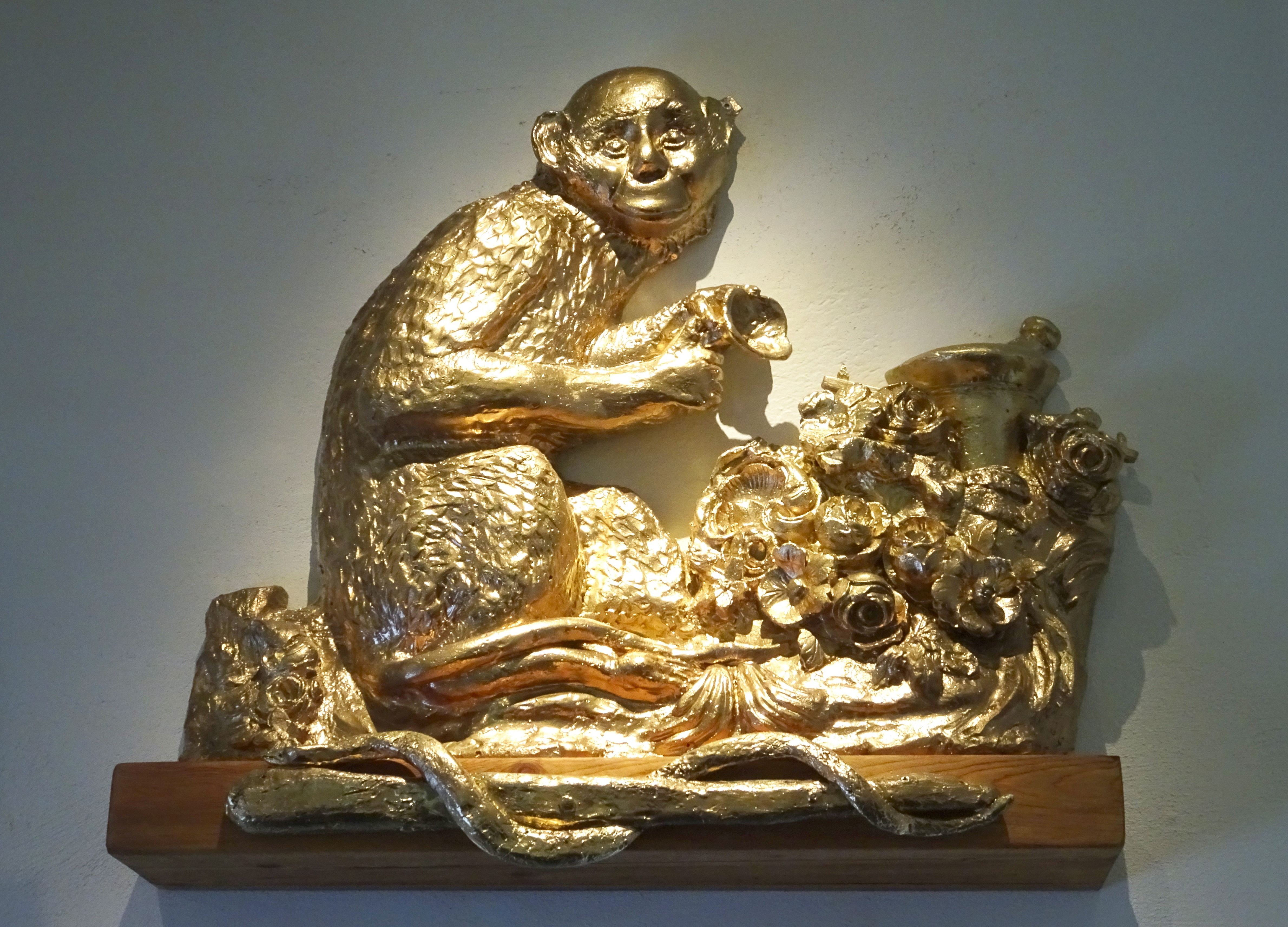 Stadsmuseet, interiör, Stockholmsutställningen, Apoteket Markattans emblem.